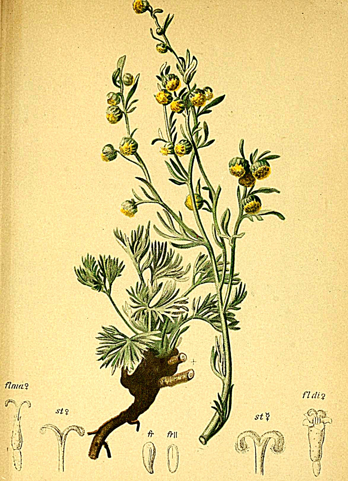 Artemisia mutellina (Artemisia umbelliformis)